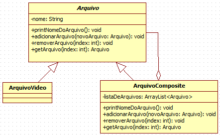 Diagrama de classes UML representando uma implementação do padrão de projetos Composite.